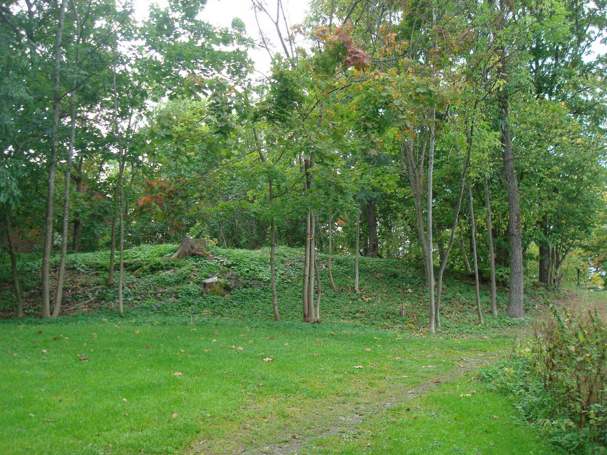 Gravhaug på Sogn studentby i Oslo.